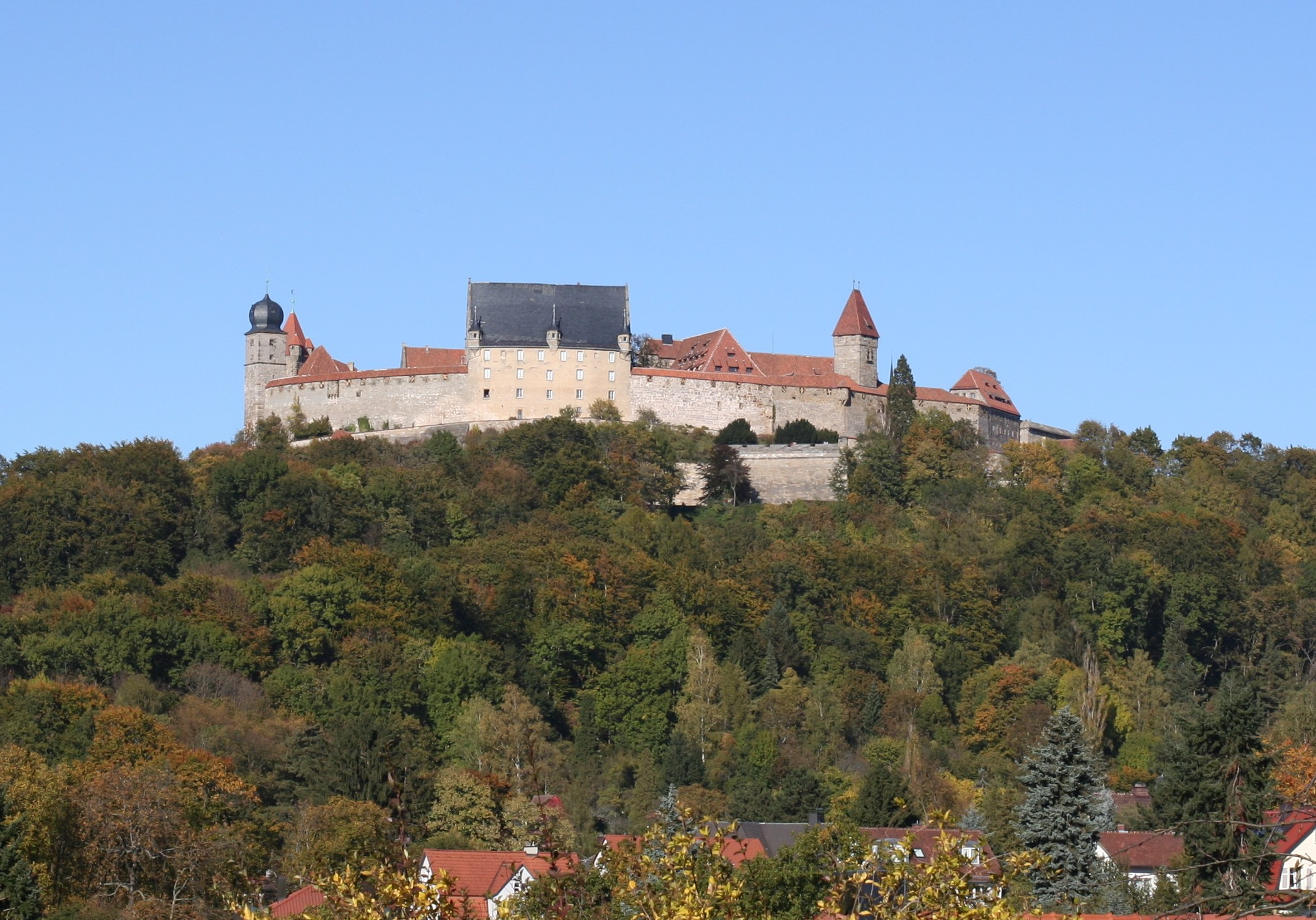 Veste, Blick aus Malmedy-str. Coburg (Germany)